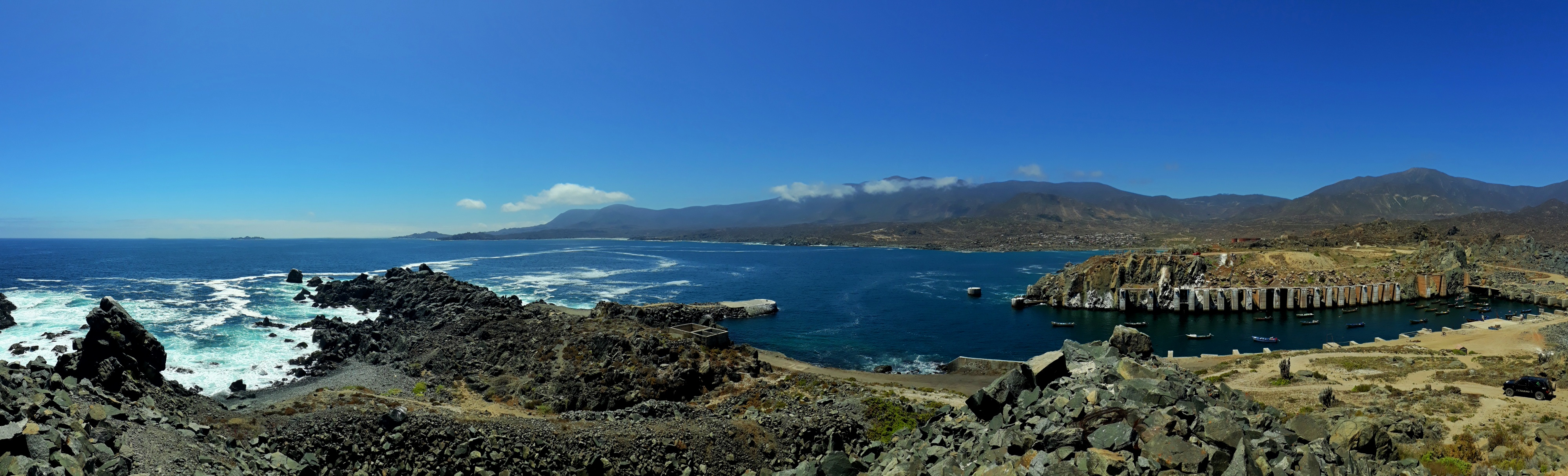 Vista panoramica Chungungo